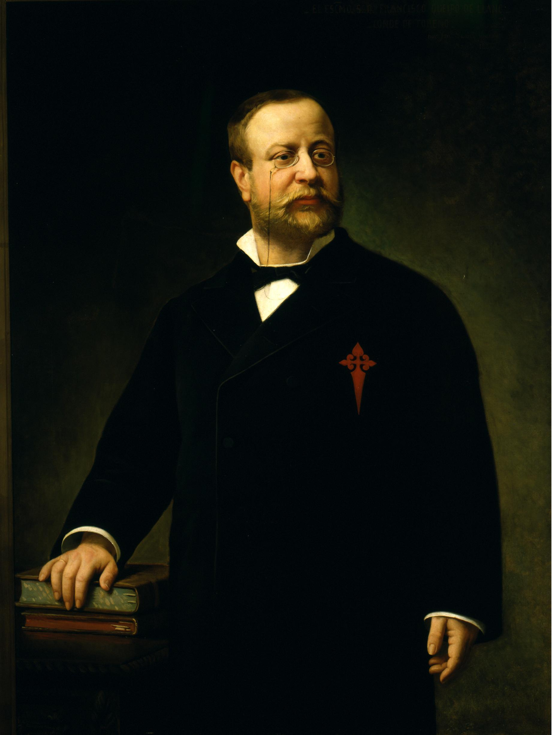 El retrato representa al aristócrata y politico español Francisco de Borja Queipo de Llano (1840-1890), que fue el VIII conde de Toreno, alcalde de Madrid. Y también fue diputado a Cortes por Asturias en once ocasiones, Presidente del Congreso de los Diputados en varias ocasiones, ministro de Fomento y de Estado, gobernador civil de Madrid y senador por derecho propio.